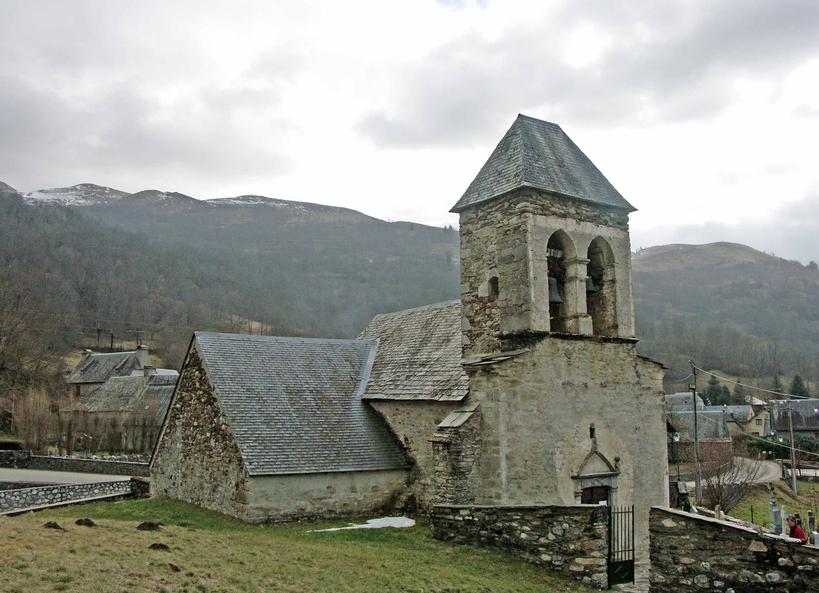 Armenteule : l'église Saint Félix